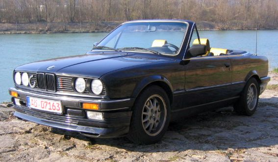 BMW Cabriolet E30